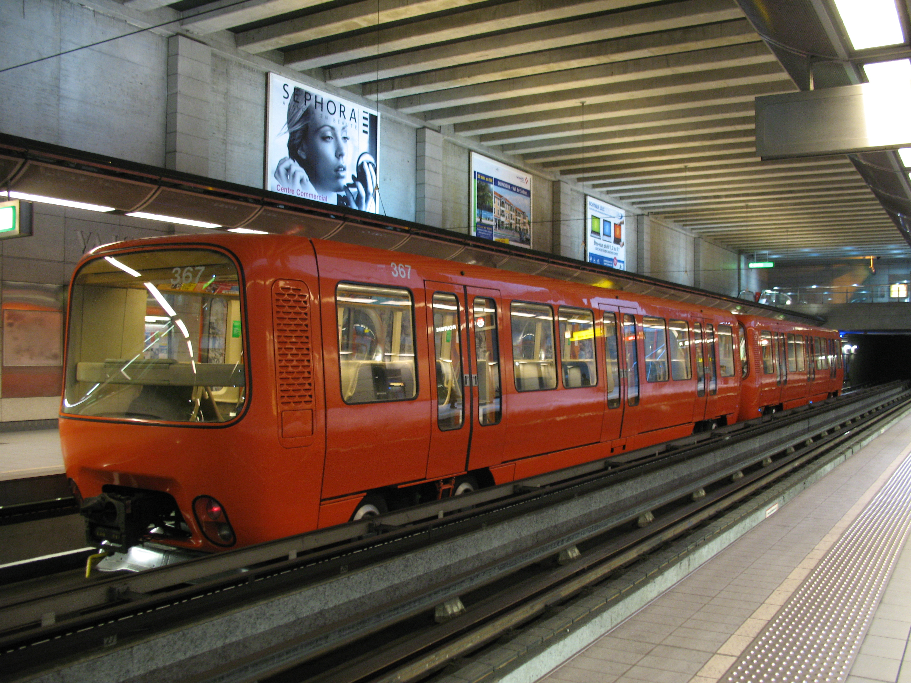 Rame de métro MPL 85 sur la ligne D à Gare de Vaise - TCL Lyon